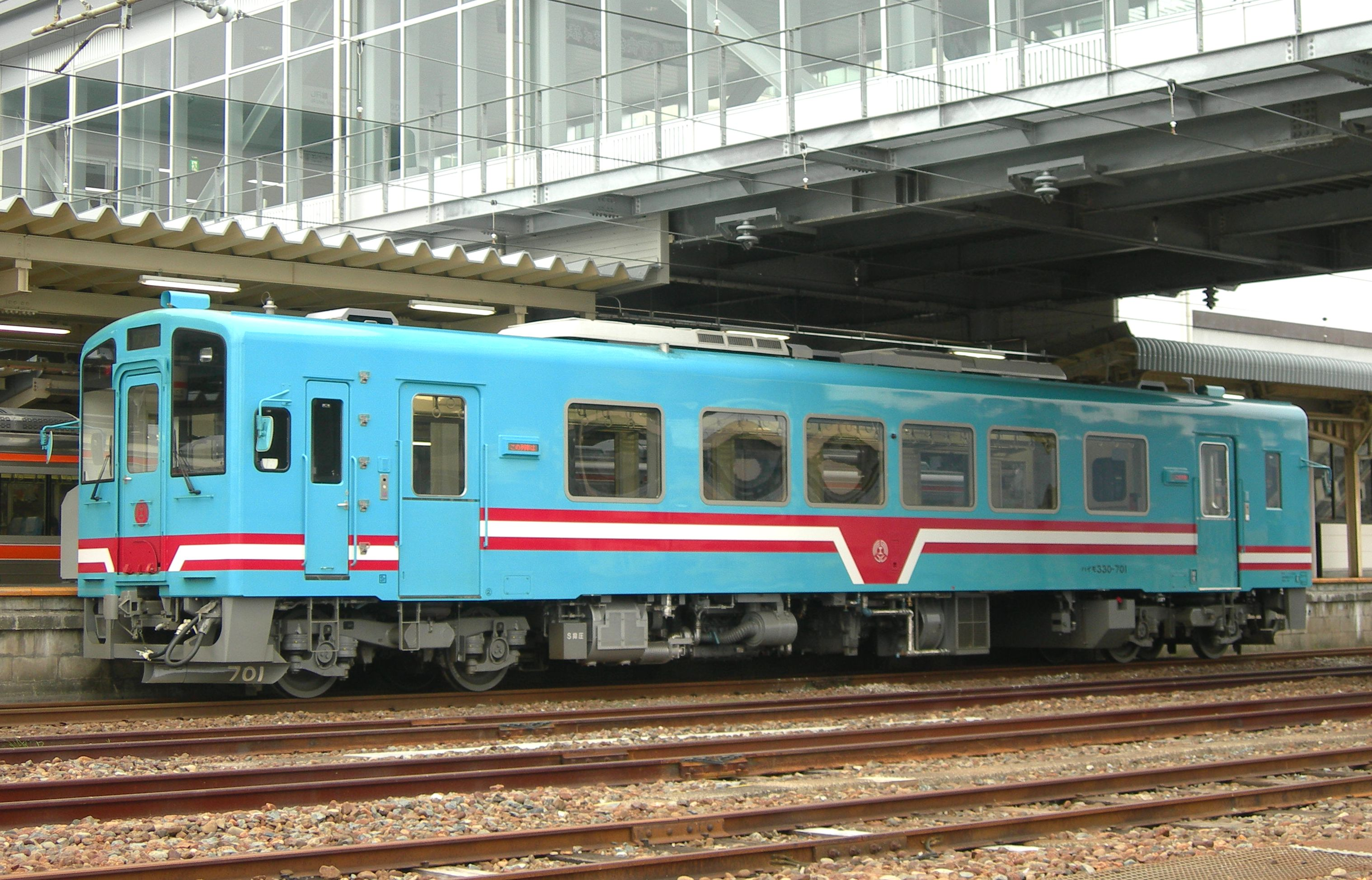 樽見鉄道ハイモ330-701